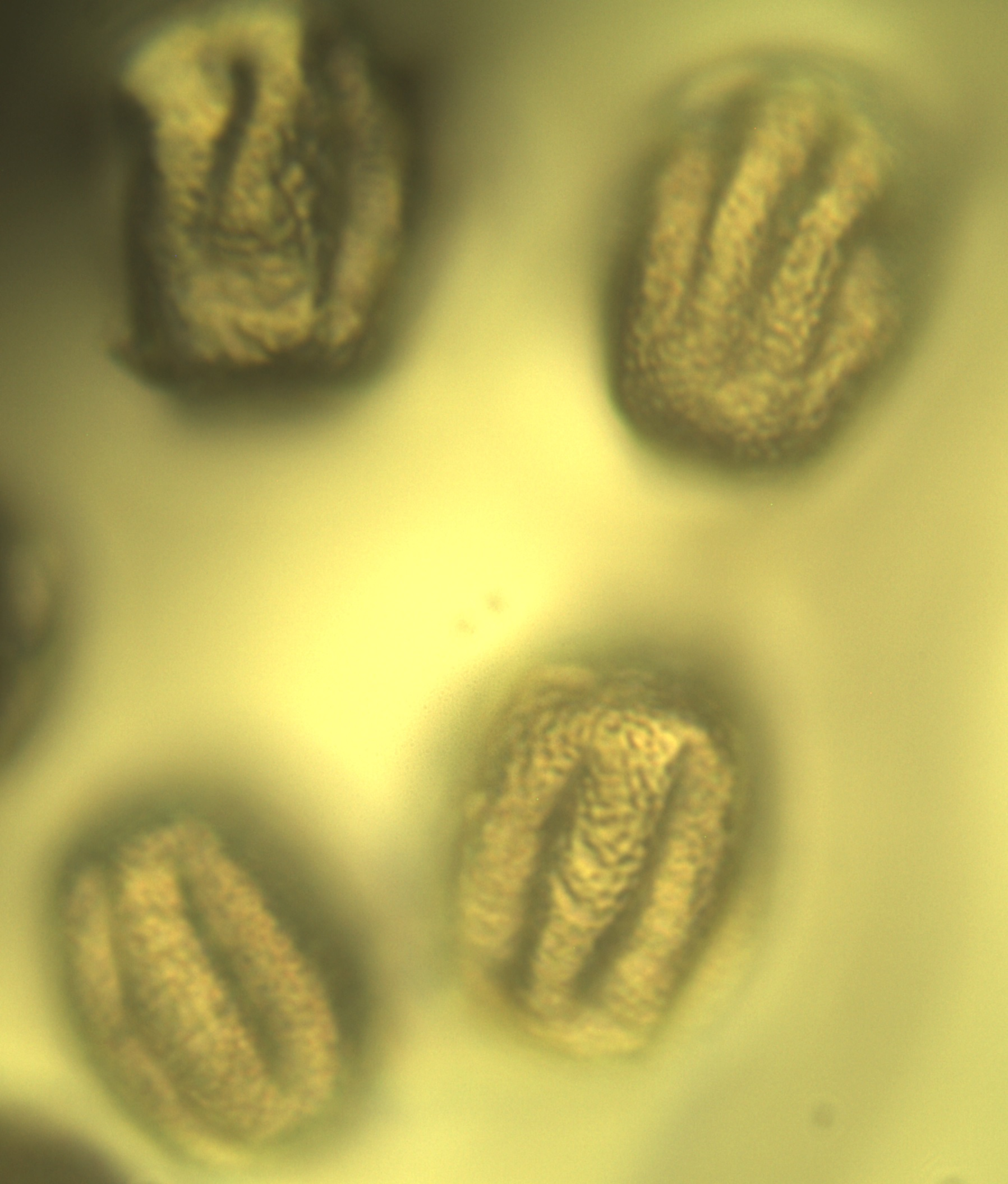 Pollenkörner der Wald-Schlüsselblume im Lichtmikroskop.